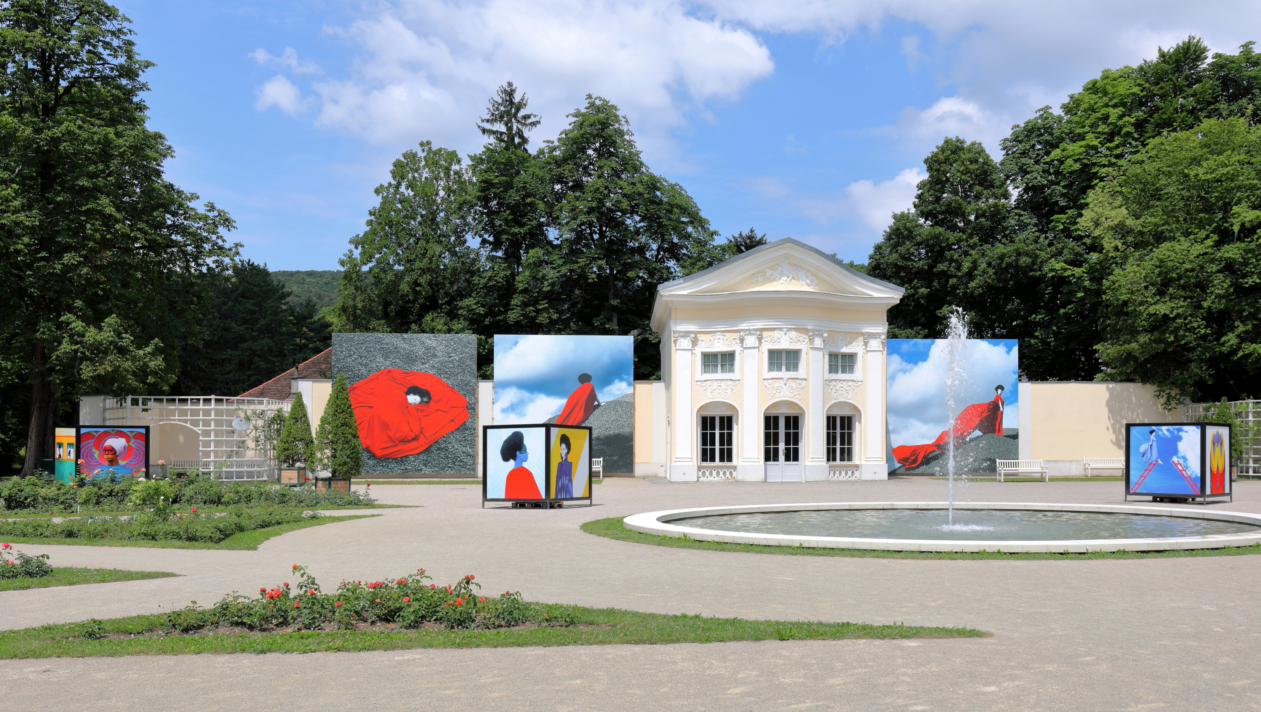 Pavillon der ehemaligen Orangerie im Doblhoffpark in der niederösterreichischen Stadt Baden mit Fotos der Open-Air Fotoausstellung Fotofestival La Gacilly-Baden 2018. Der ehemalige Schlosspark des Schlosses Weikersdorf ist nach dem Adelsgeschlecht Doblhoff benannt, die von 1741 bis zum Ankauf durch die Stadtgemeinde Baden im Jahr 1966 im Besitz des Schlosses und Parks waren. 1969 wurde ein Rosarium in dem rund 8 Hektar großen Park in Kooperation mit der Stadtgemeinde, den österreichischen Baumschulen und dem Architekt Viktor Mödlhammer eröffnet. 2018 wurden dabei ca. 600 Rosensorten präsentiert.